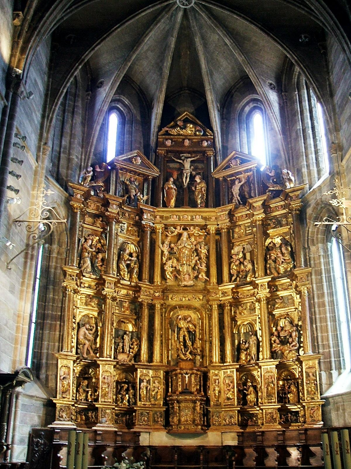 Retablo Mayor renacentista-romanista (s-XVI) de la Colegiata de San Miguel Arcángel, Aguilar de Campoo, Palencia, España